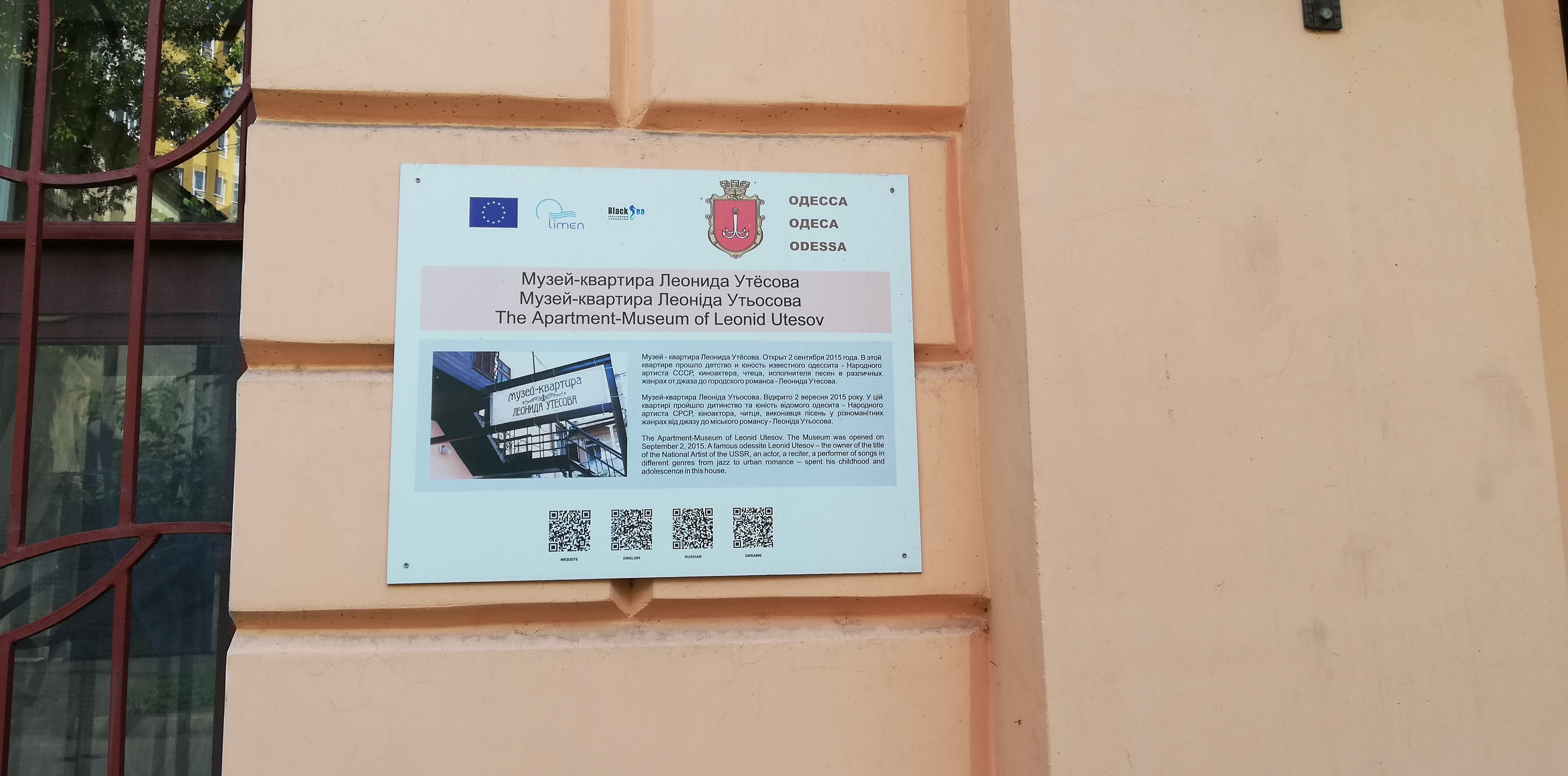 Музей-квартира Леонида Утёсова